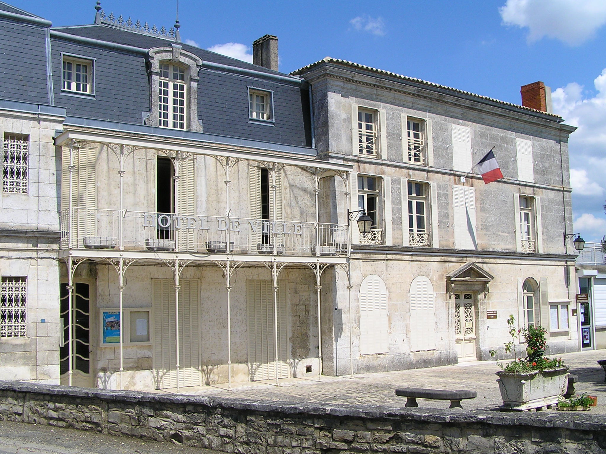 Mairie de Fléac